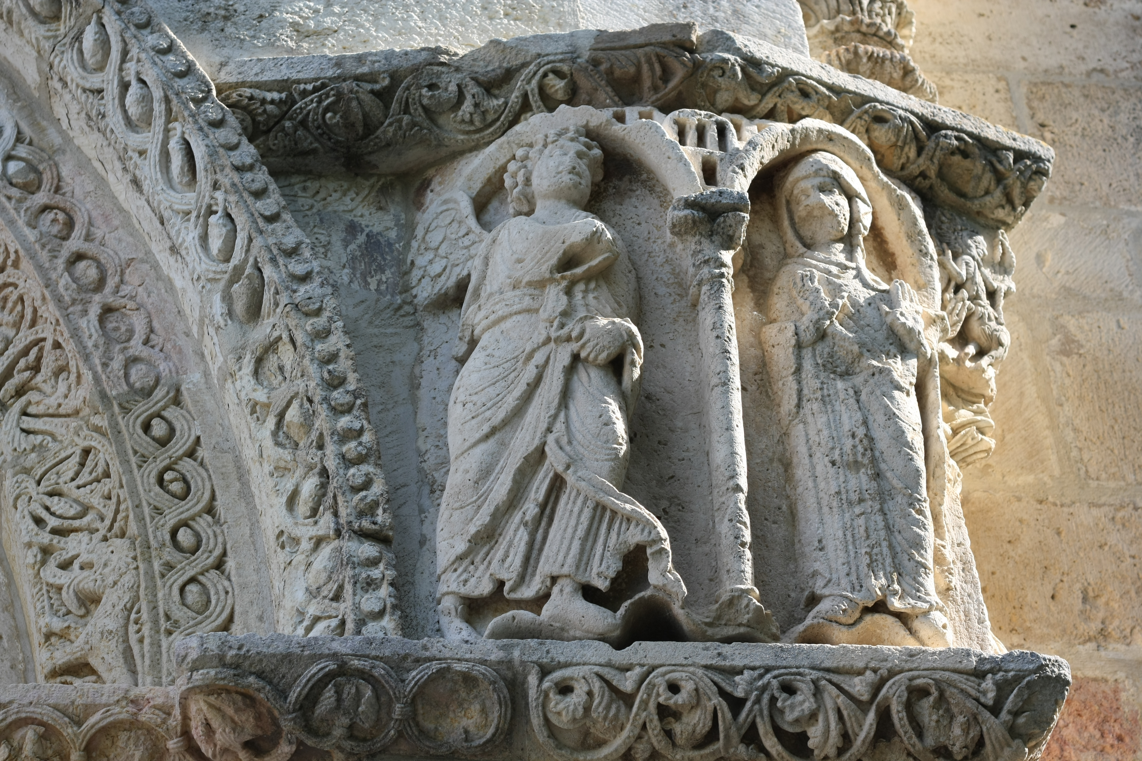 Romanische Klosterkirche Nuestra Señora de Estíbaliz, Südportal Porta Speciosa, Kämpfer mit Darstellung der Verkündigung Mariens